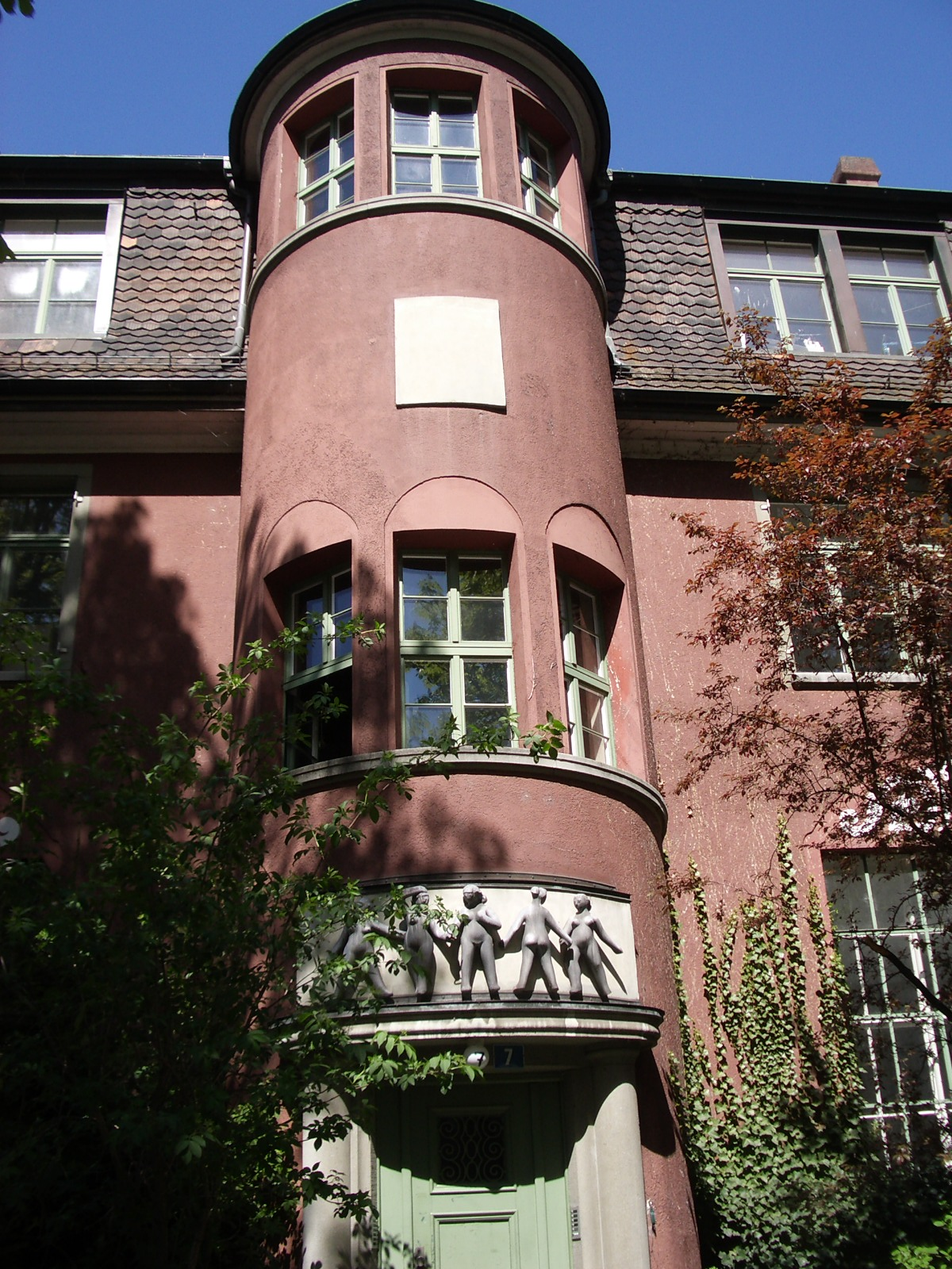 Zurich, Switzerland self-made, April 2007